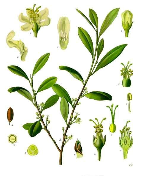 Coca. A blühender Zweig, natürl. Grösse; 1 Nebenblättchen, vergrössert; 2 Blüthenknospe, desgl.; 3 Blüthe, desgl.; 4 und 5 Kronblatt mit Ligula von vorn und von der Seite, desgl.; 6 innere Blüthentheile, Stempel mit den unten verwachsenen Staubgefässen, desgl.; 7 Staubgefäss, desgl.; 8 Stempel, desgl.; 9 Fruchtknoten im Querschnitt, mit einem fruchtbaren und 2 unfruchtbaren Fächern, desgl.; 10 Kelch mit den inneren Blüthentheilen, desgl.; 11 dieselbe Figur im Längsschnitt, desgl.; 12 Frucht, desgl.; 13 dieselbe zerschnitten, desgl.